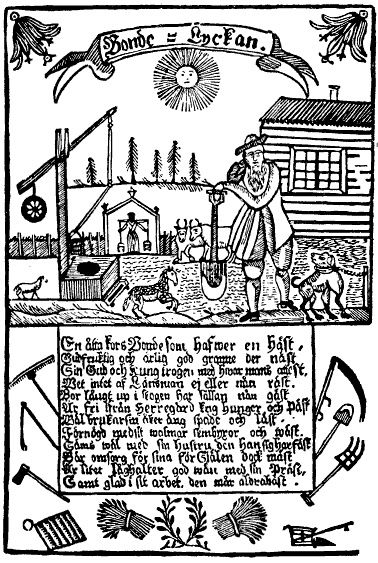 Ett kistbrev.